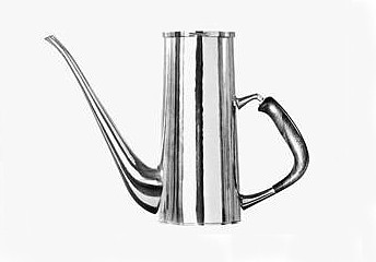 Silverkanna, formgivning Sigurd Persson